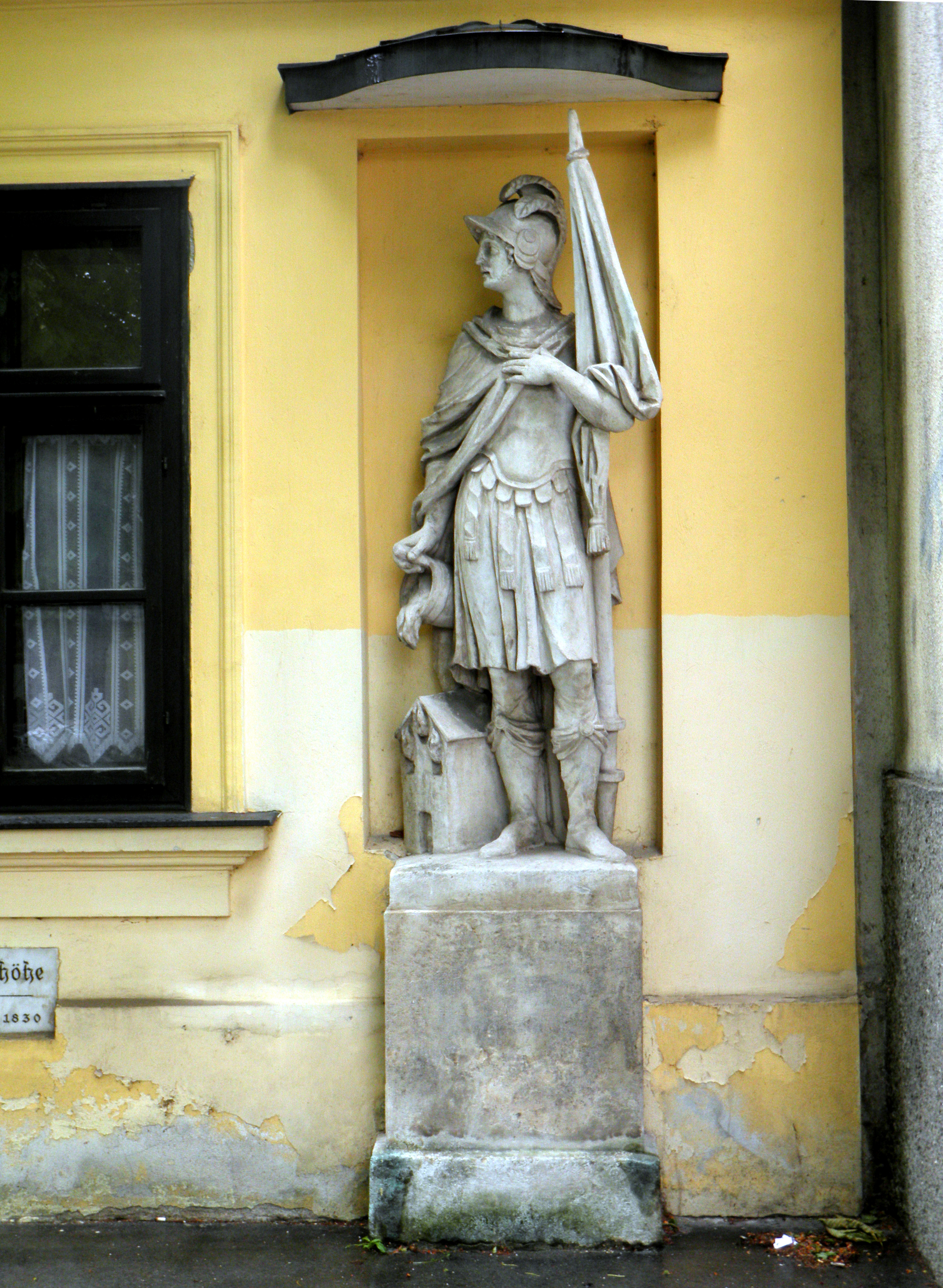 Hl. Florian